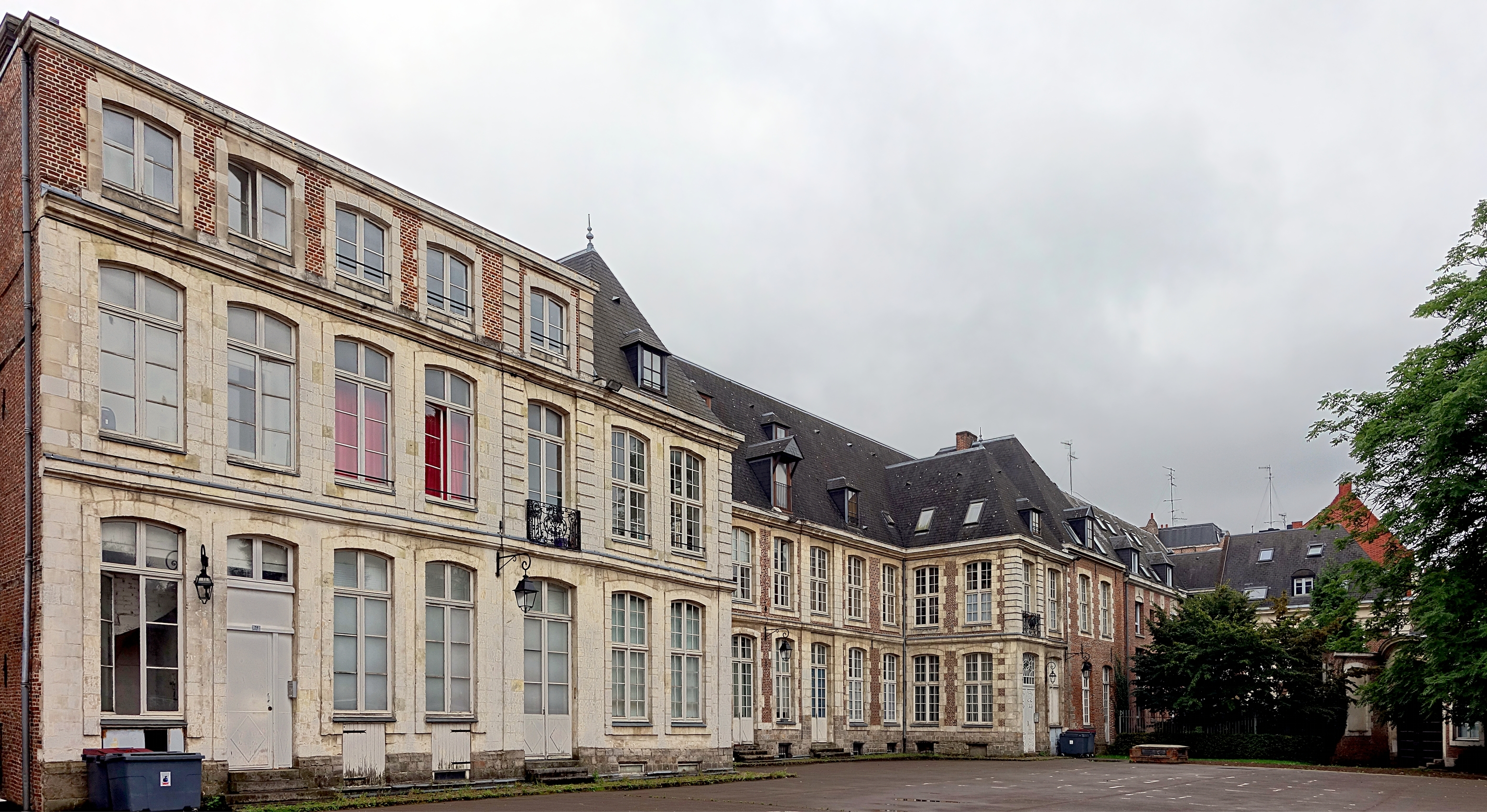 Abbaye de Loos (Inscrit) à Lille, Nord. .